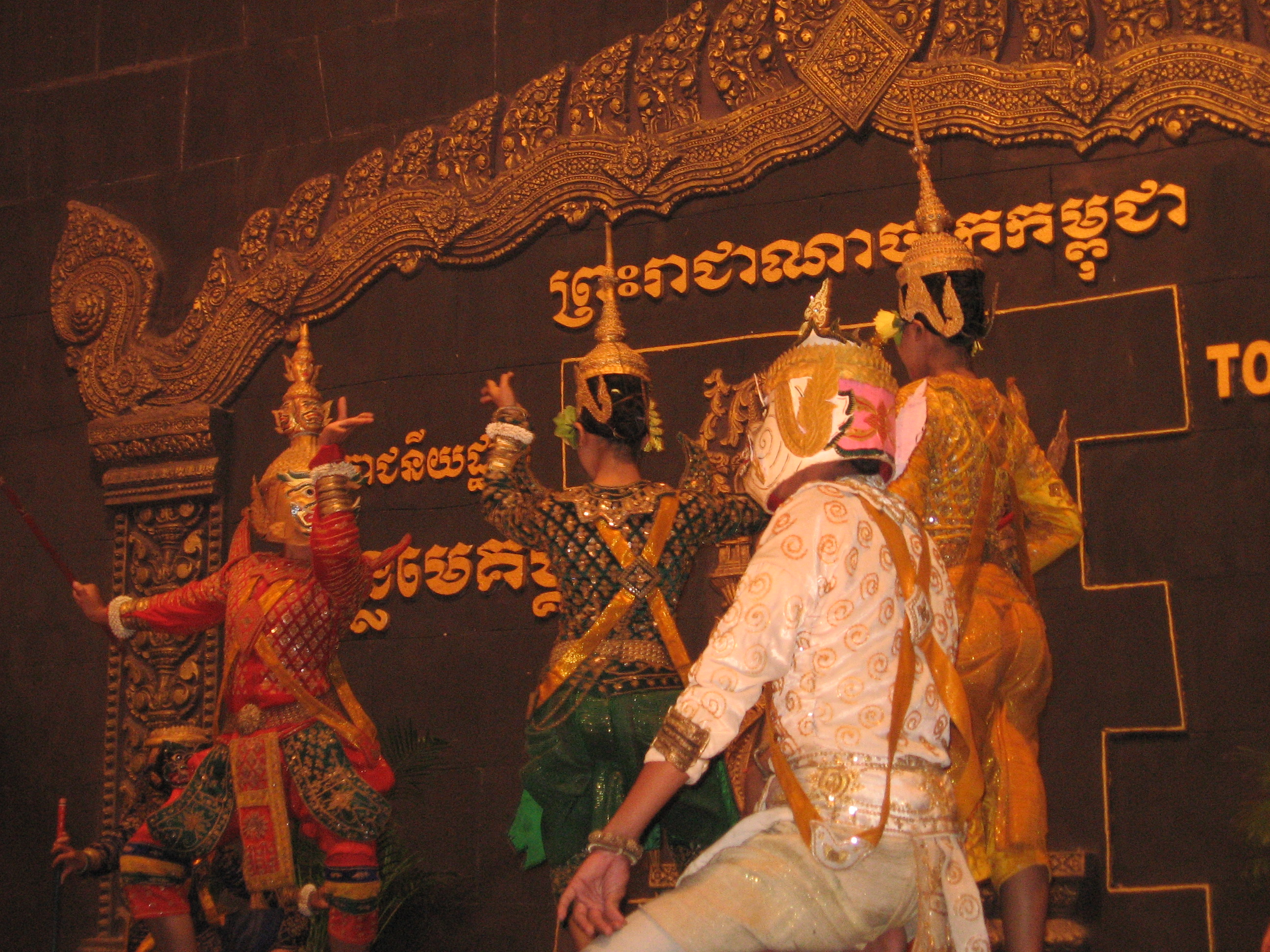 Một vở diễn trong Riêm Kê - ảnh do Phan Minh Châu chụp tại Siêm Riệp